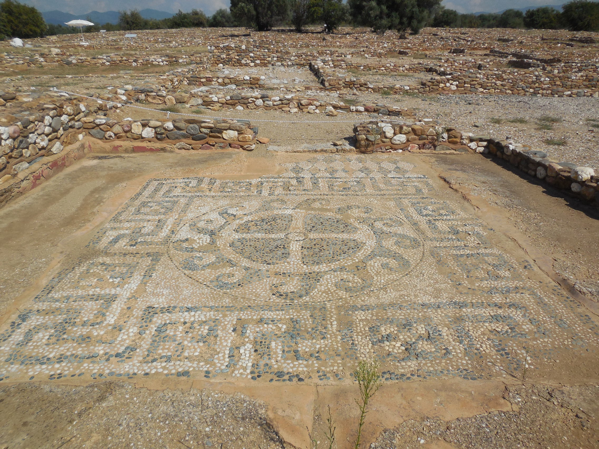 Mosaik in Olynth